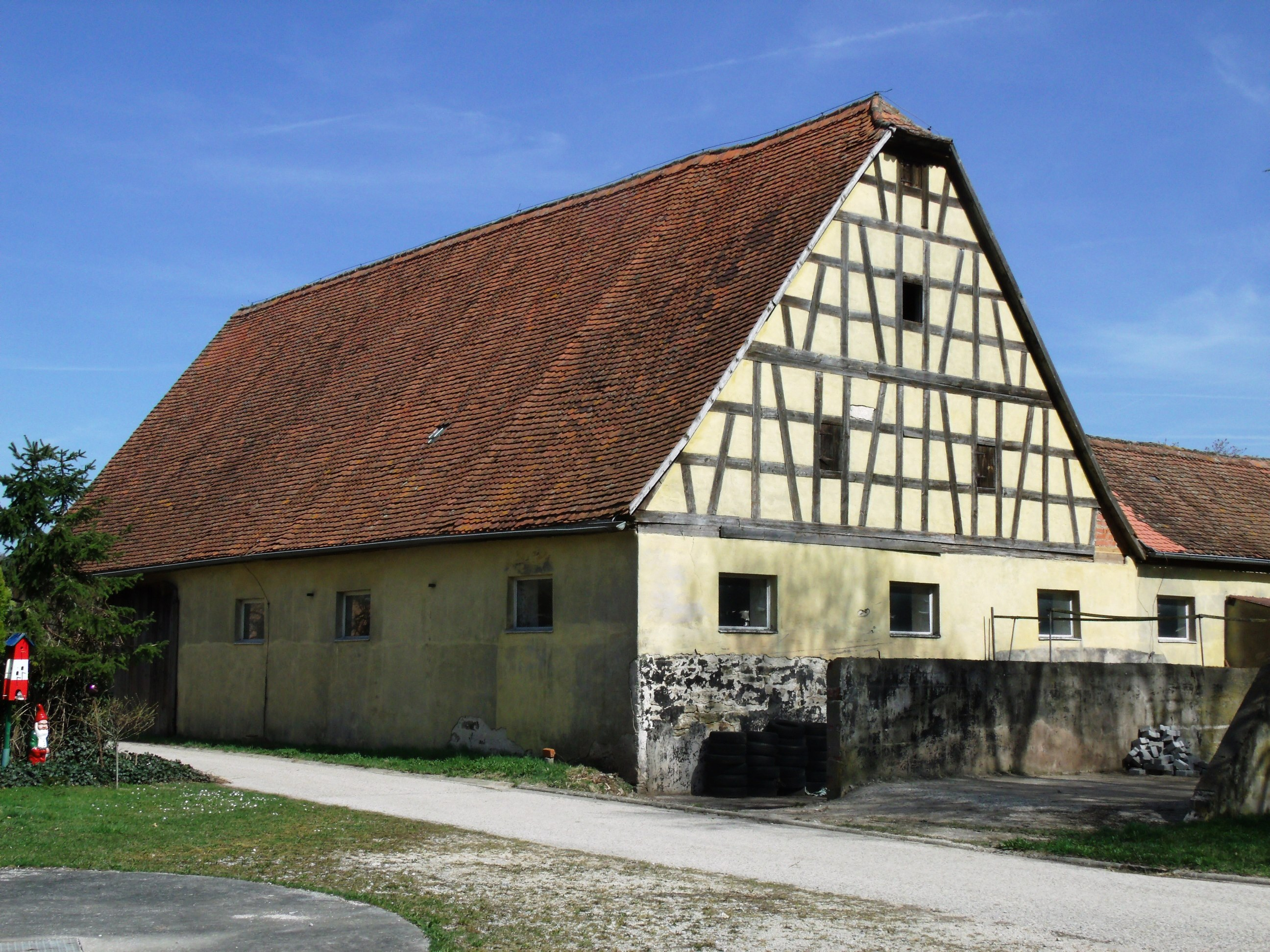 Erlbach, Ortsteil von Leutershausen im Landkreis Ansbach